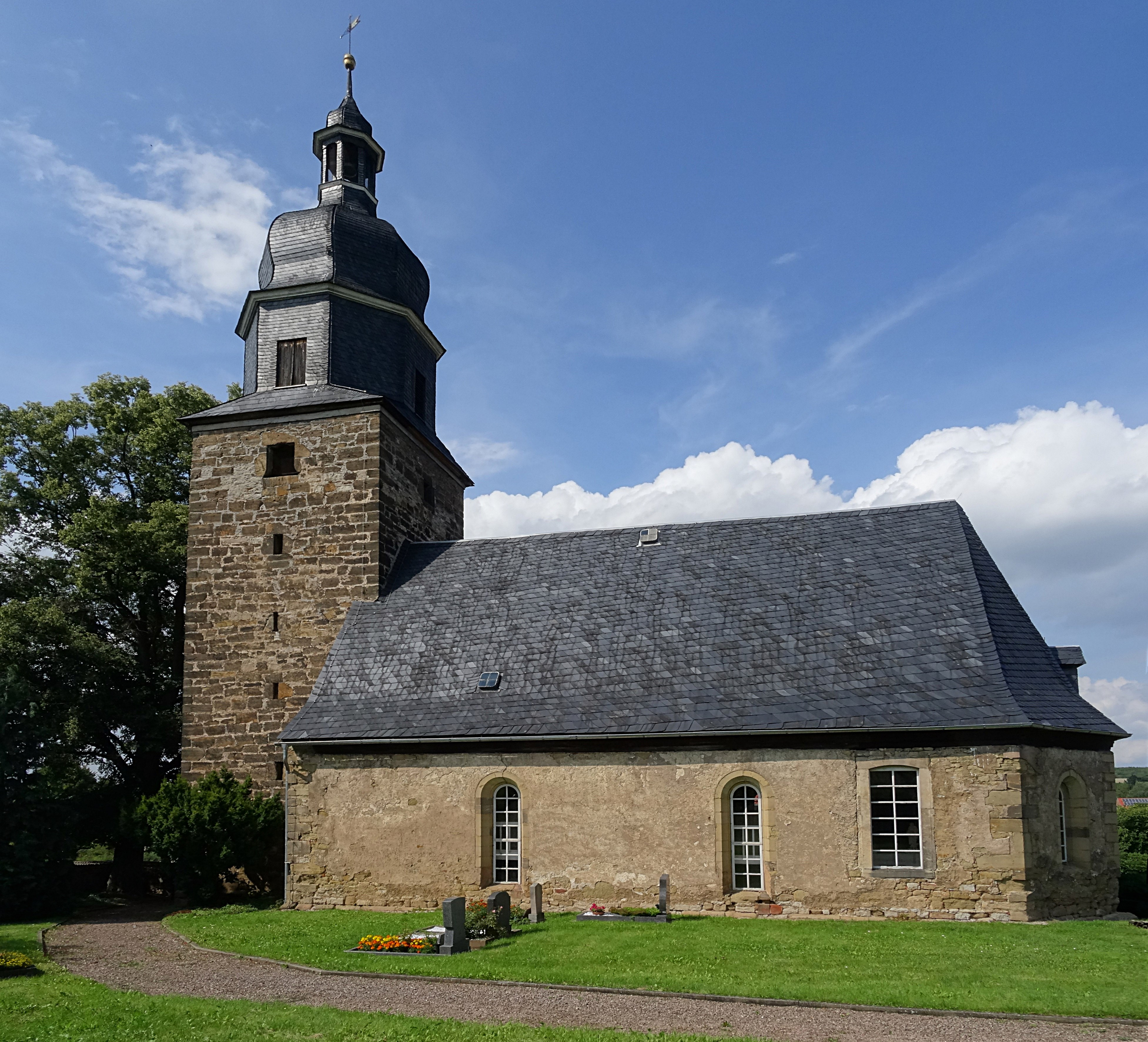 Dorfkirche St. Elisabeth Rockhausen von 1690 mit Kirchturm aus dem 13. Jh.